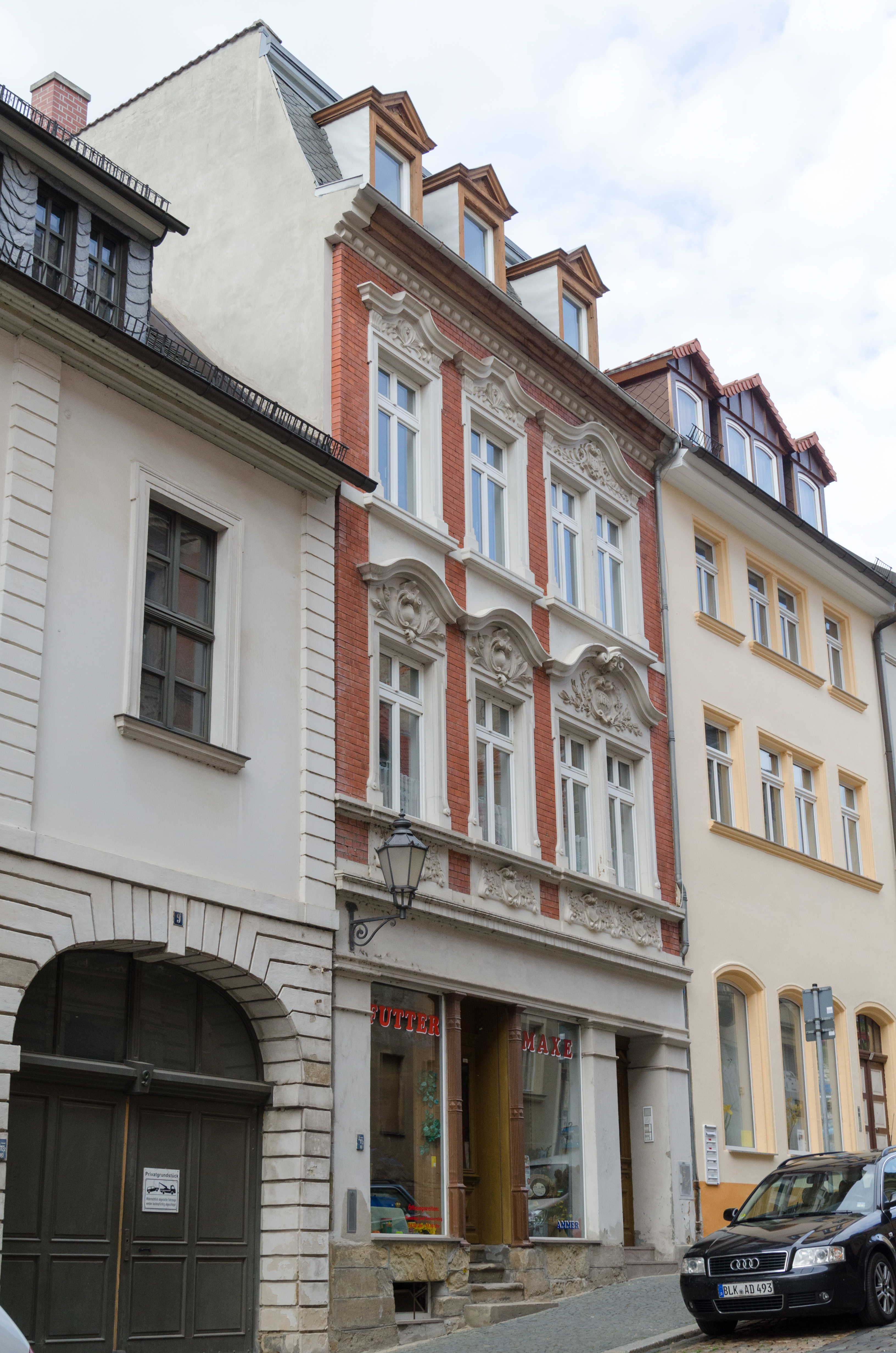 Zeitz, Messerschmiedestraße 8